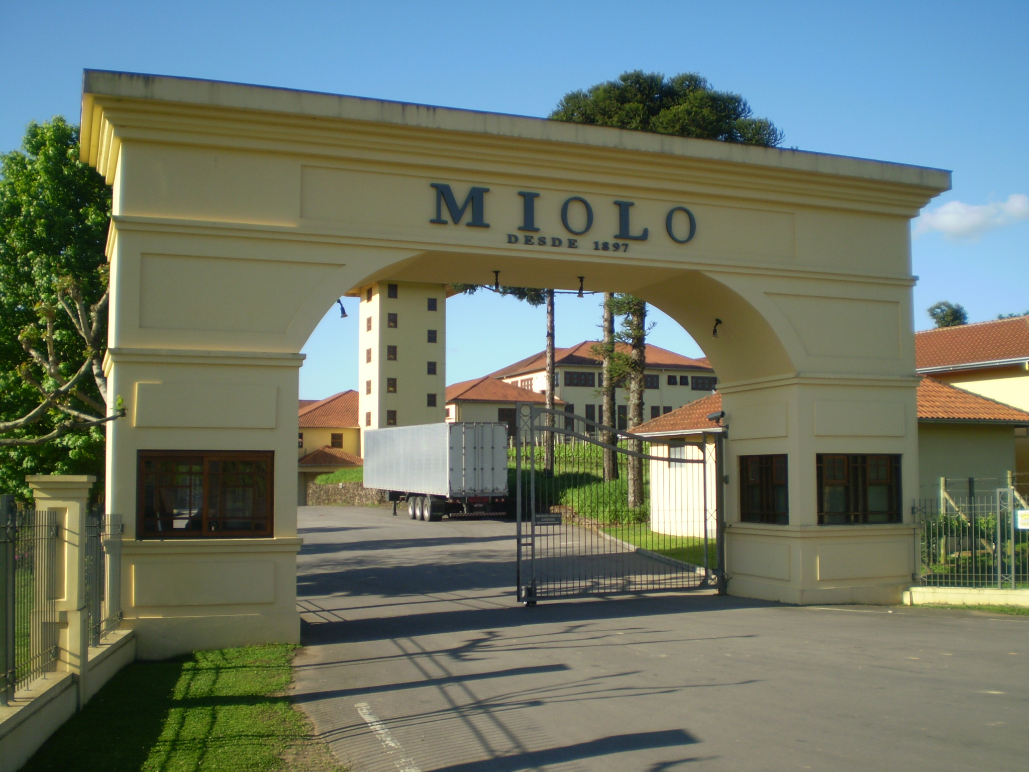 Entrada da vinicola Miolo.